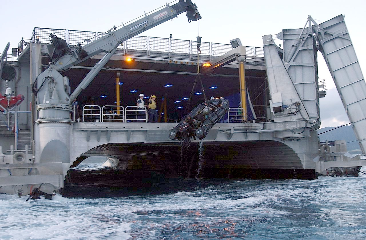 Heckansicht der USS Swift (HSV-2), Einholen eines Bootes mit dem Kran, rechts die eingeklappte Landungsbrücke